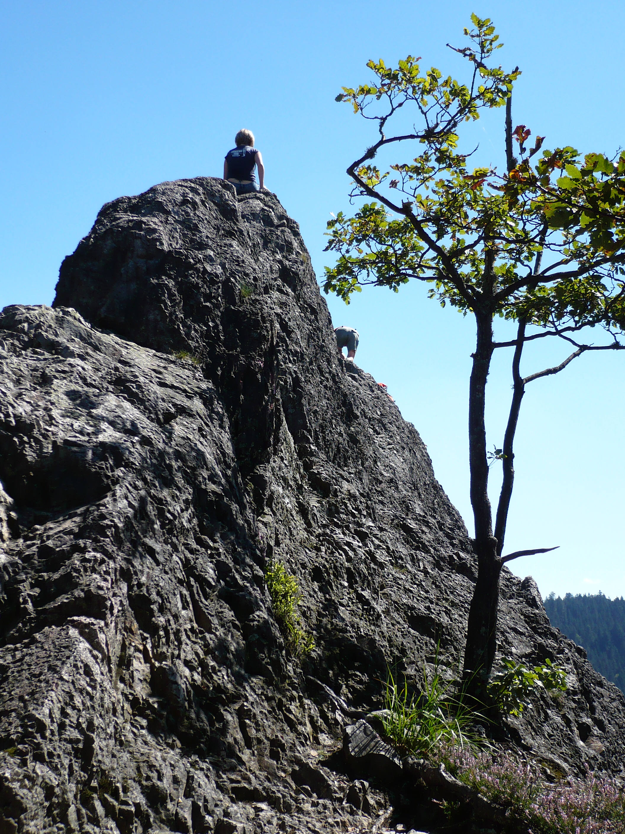 Karlsruher Grat 4